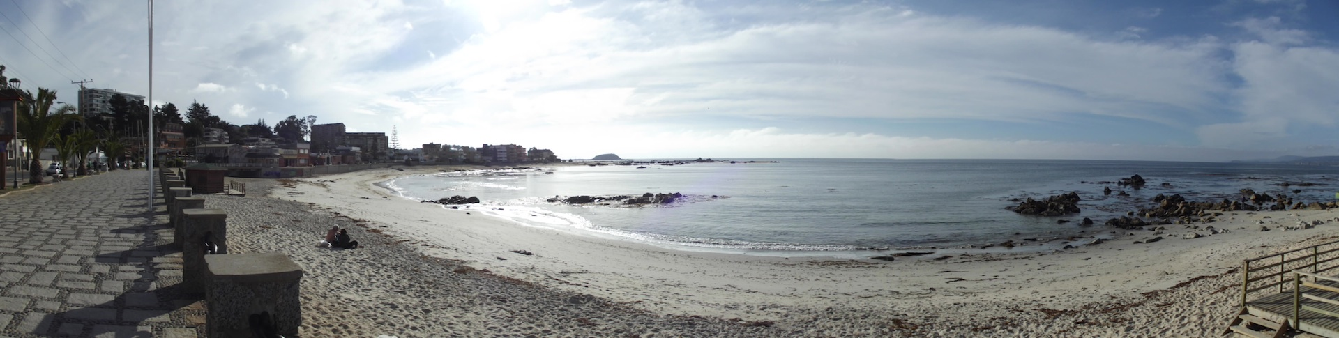 playa Las Cadenasen la ciudad de Algarrobo Chile